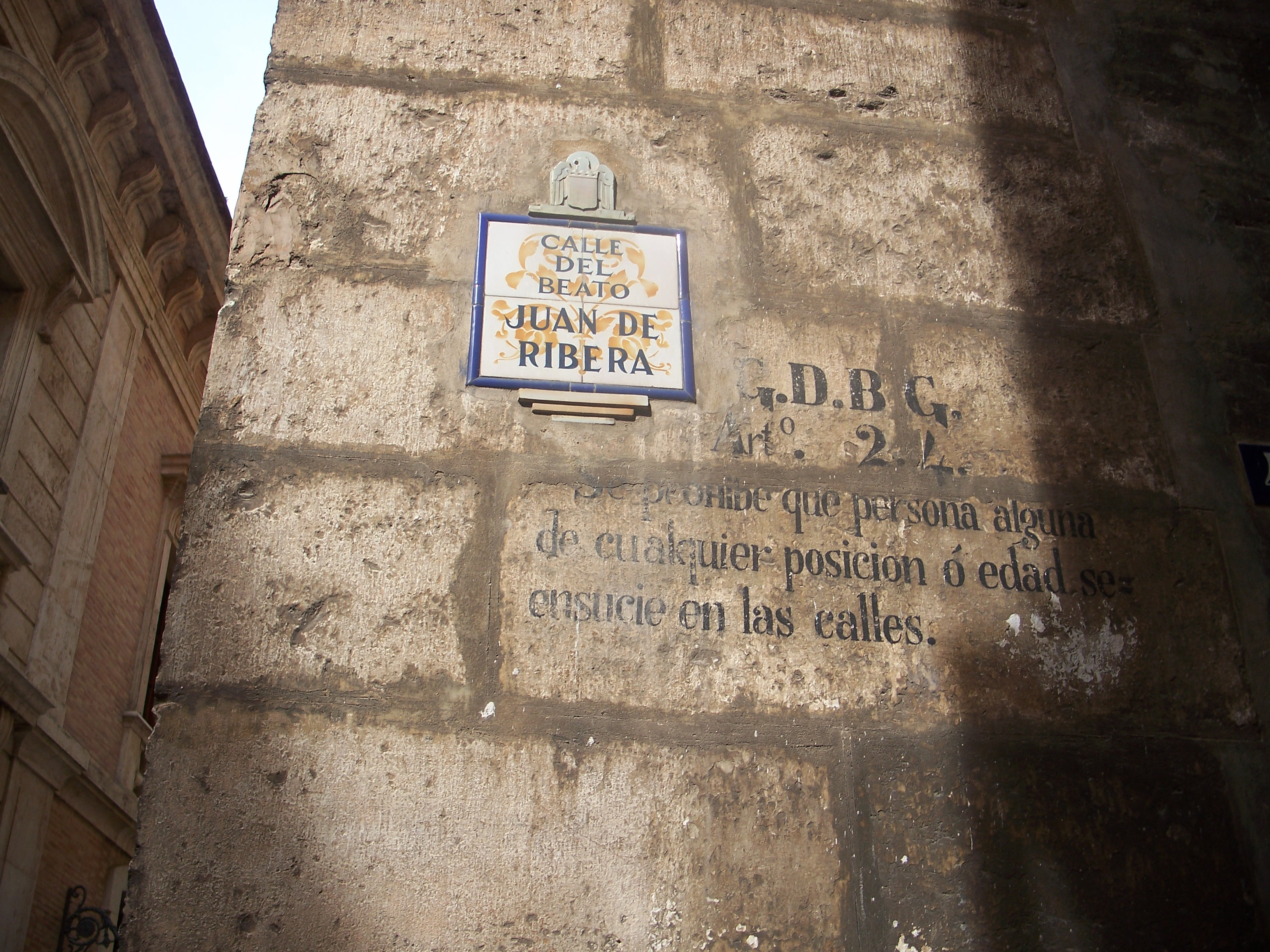 Carrer_del_Beato_Juan_de_la_Ribera_(Símbol_Franquista)_València_Setembre_2008